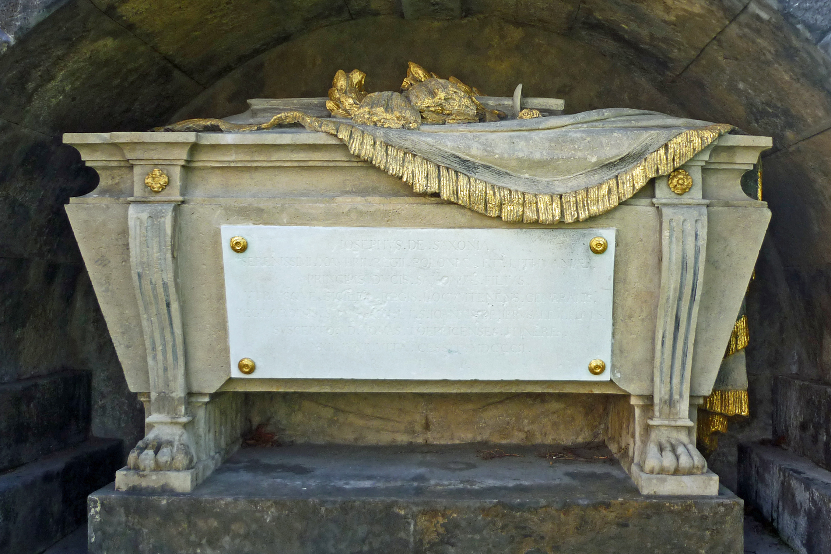 Grabdenkmal des Prinzen Joseph Xavier Karl Raphael Philipp Benno von Sachsen bzw. von der Lausitz (1767–1802), genannt Chevalier de Saxe (Sohn von Franz Xaver von Sachsen), von Franz Pettrich auf dem alten Friedhof an der Pfarrkirche St. Peter und Paul in Ossegg (Osek). Der Prinz verstarb am 26. Juni 1802 nach einem Duell mit dem russischen Fürsten Schtscherbatow an der Riesenburg bei Ossegg.